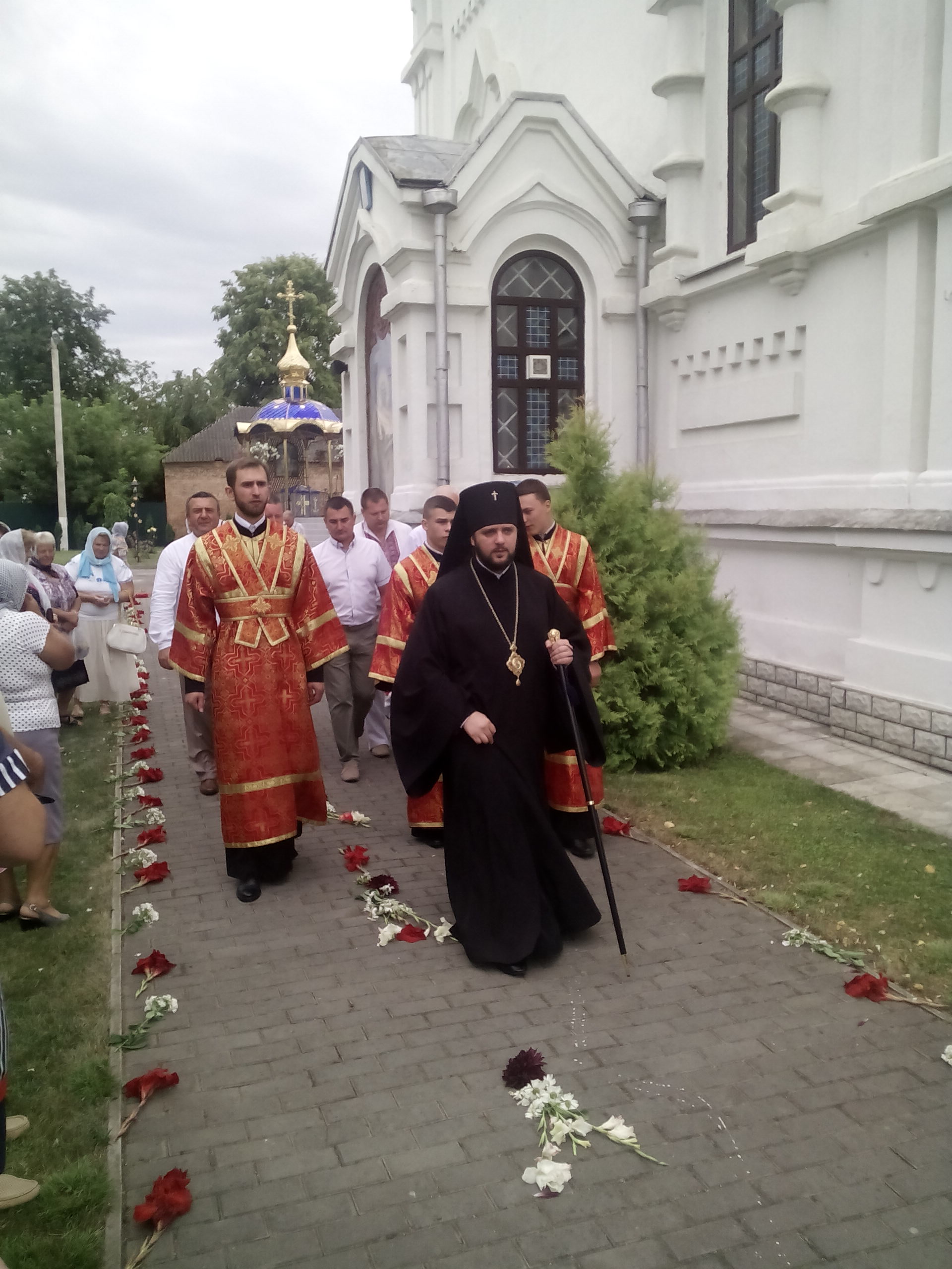 Архієпископ Рівненський і Острозький Іларіон в м. Дубно.jpg